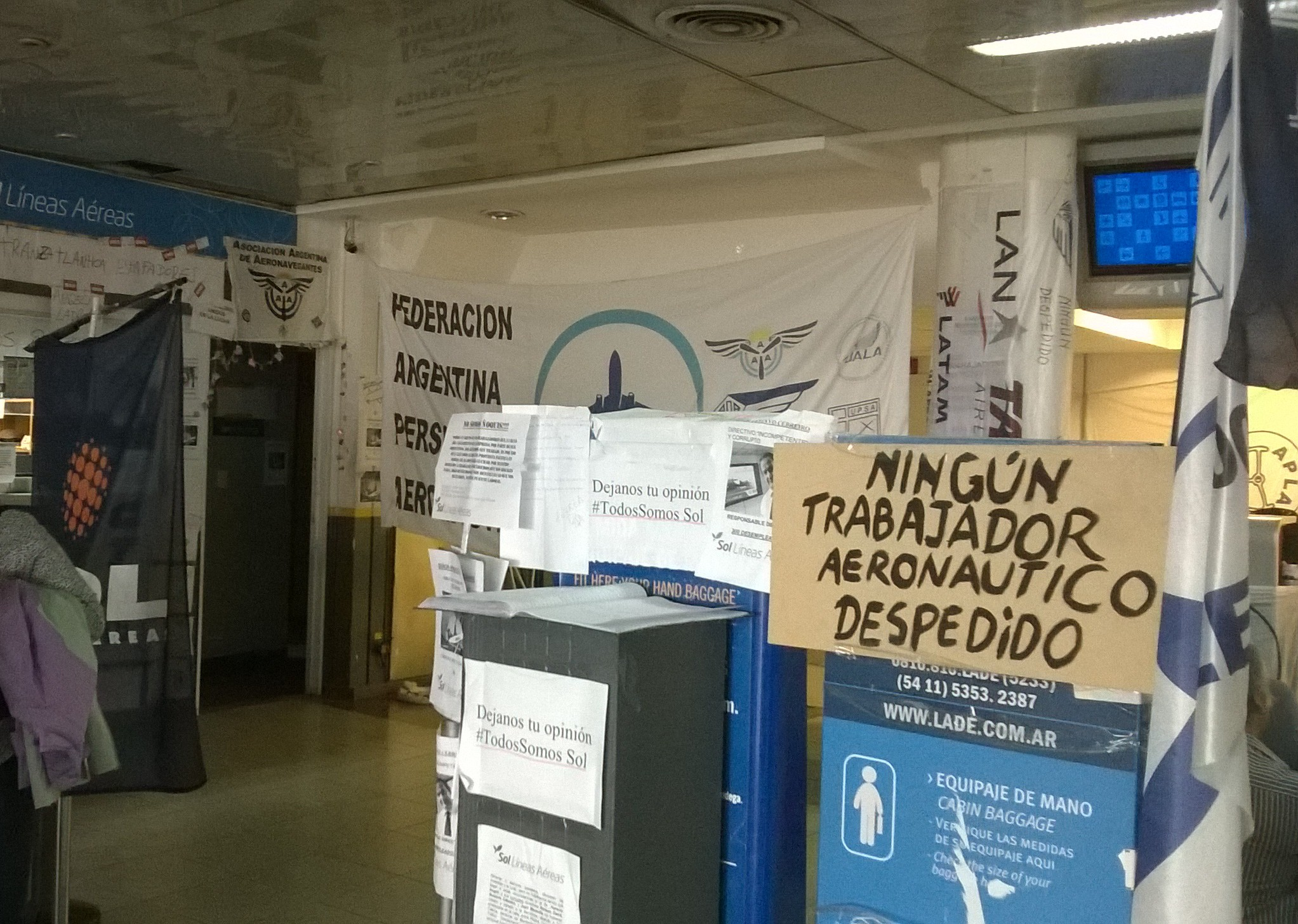 Ex oficinas de SOL en Aeroparque Jorge Newbery tomada por sus ex empleados